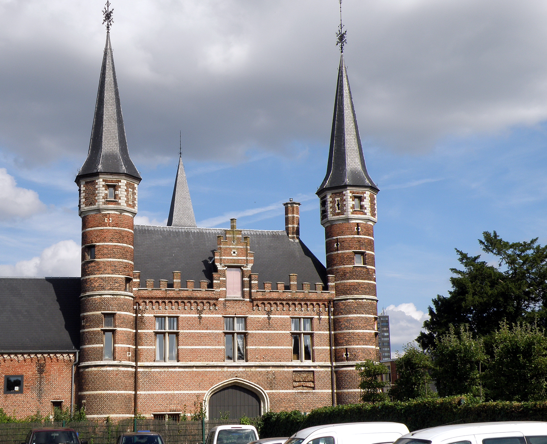 Anvers, Belgique. Château Te Couwelaer, appelé familièrement De Drie Torekens (les Trois Tourettes), sis au n° 202 de la Lakborslei à Deurne-Nord, dans la proche banlieue nord-est d’Anvers. Édifice remontant au XVe siècle, plusieurs fois remanié ensuite, mais dont l’aspect actuel résulte d’une tentative de « reconstitution » de son aspect du XVIIe (sur la foi d’un tableau de 1625) entreprise par l’archit. Joseph Schadde vers 1850. Façade ouest.